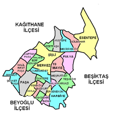 Şişli'nin mahalleleri.